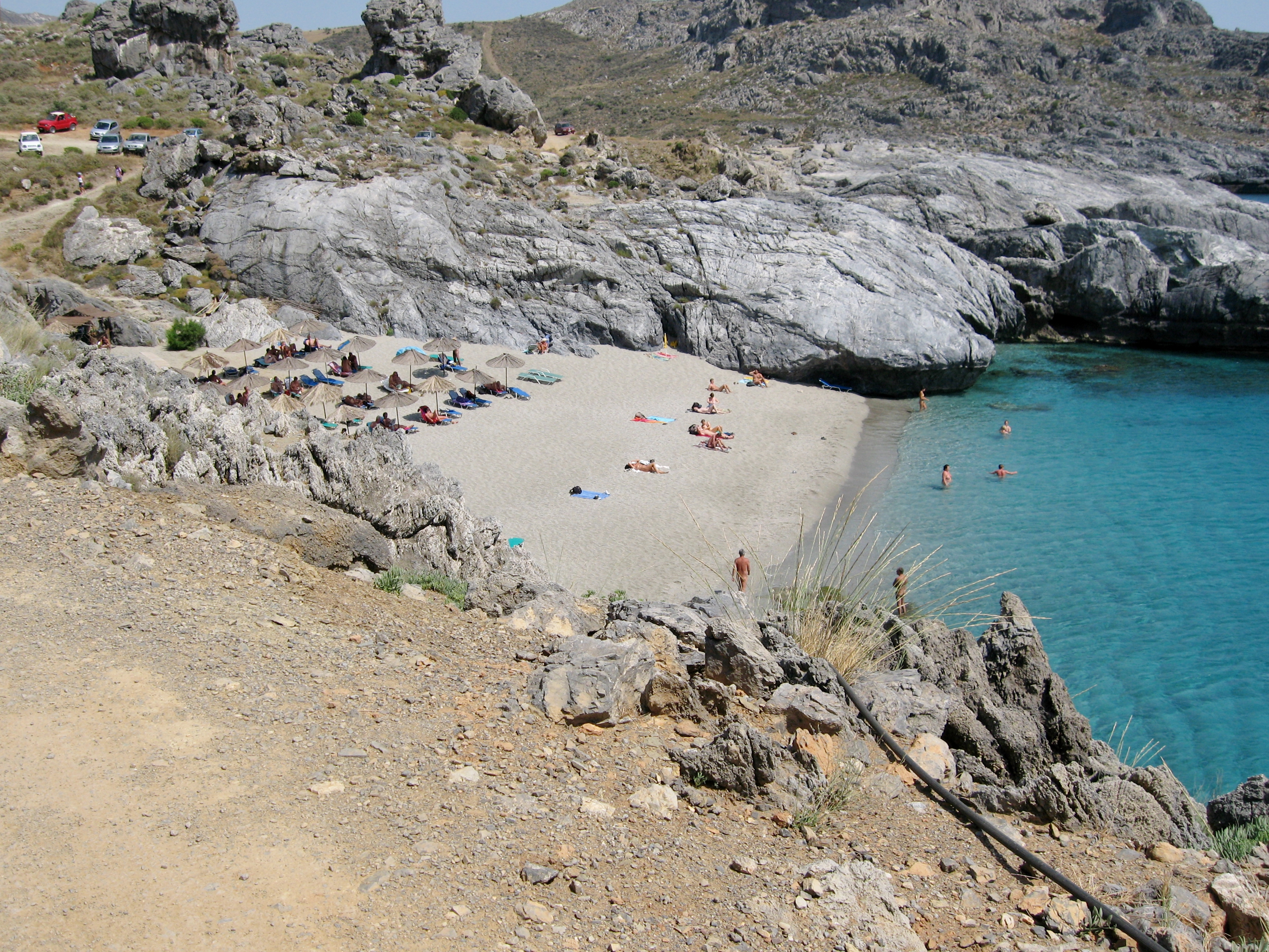 Ammoudaki (Mikro Ammoudi; Schweinebucht), Bucht bei Plakias, Gemeinde Agios Vasilios, Regionalbezirk Rethymno, Kreta, Griechenland